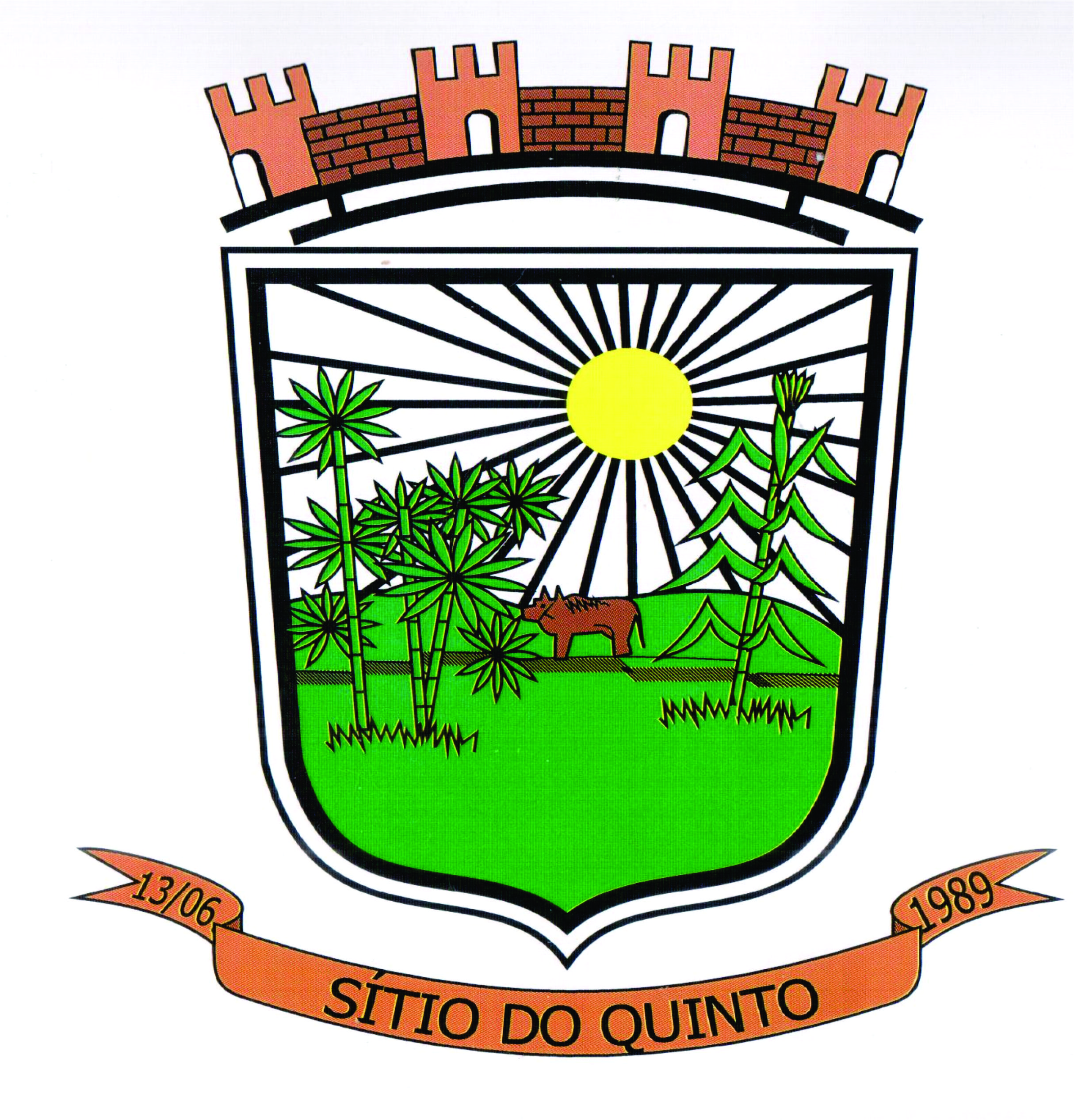 Brasão do município de Sítio do Quinto, Bahia.